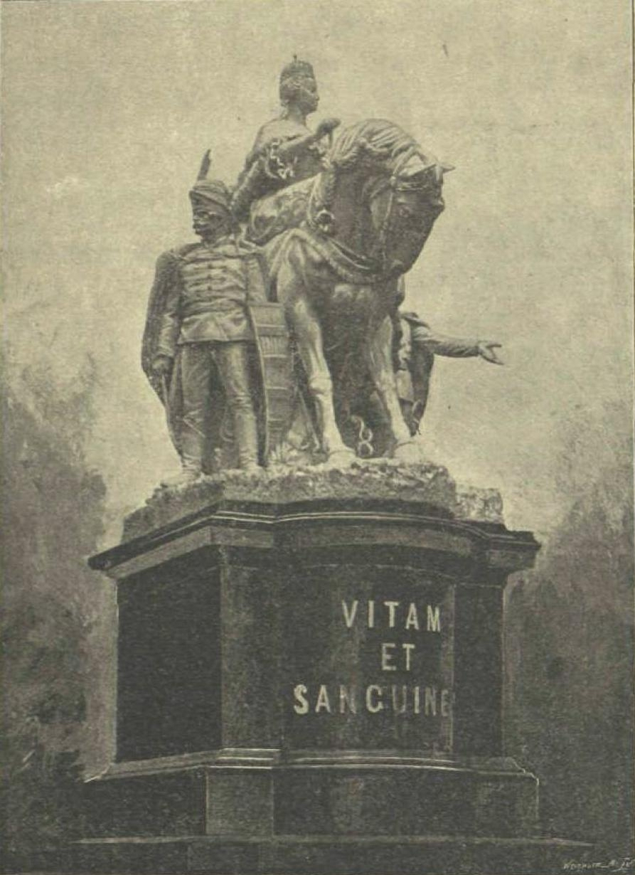 Fadrusz János: Mária Terézia